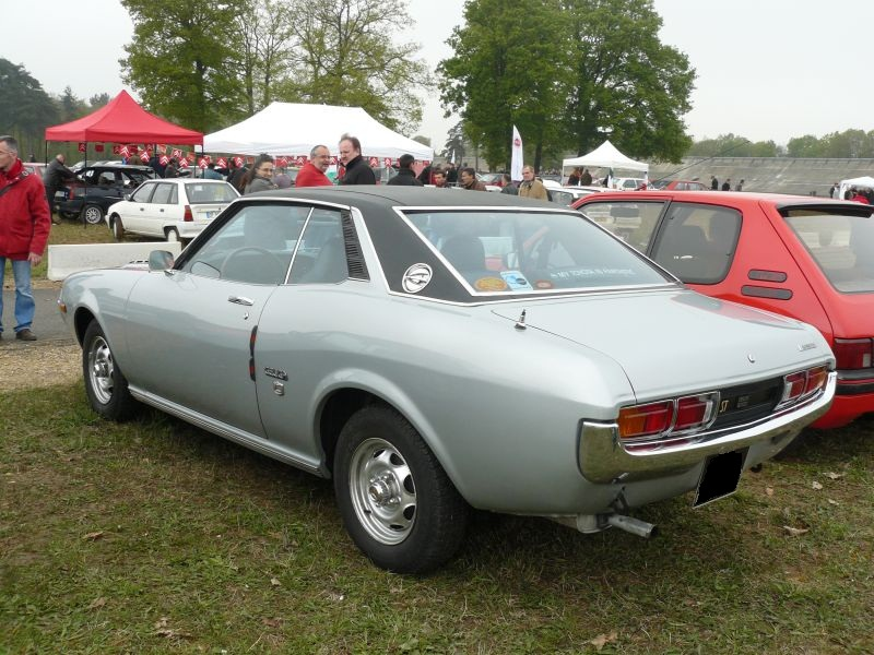 Français cadien: Montlhery Avril 2012